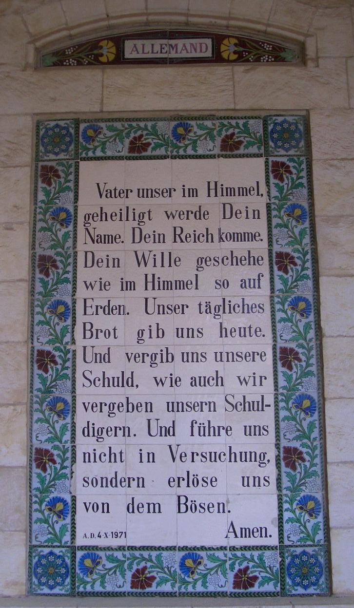 Foto der Majolikaplatte mit dem deutschen Text des Vaterunsers in der Paternosterkirche in Jerusalem